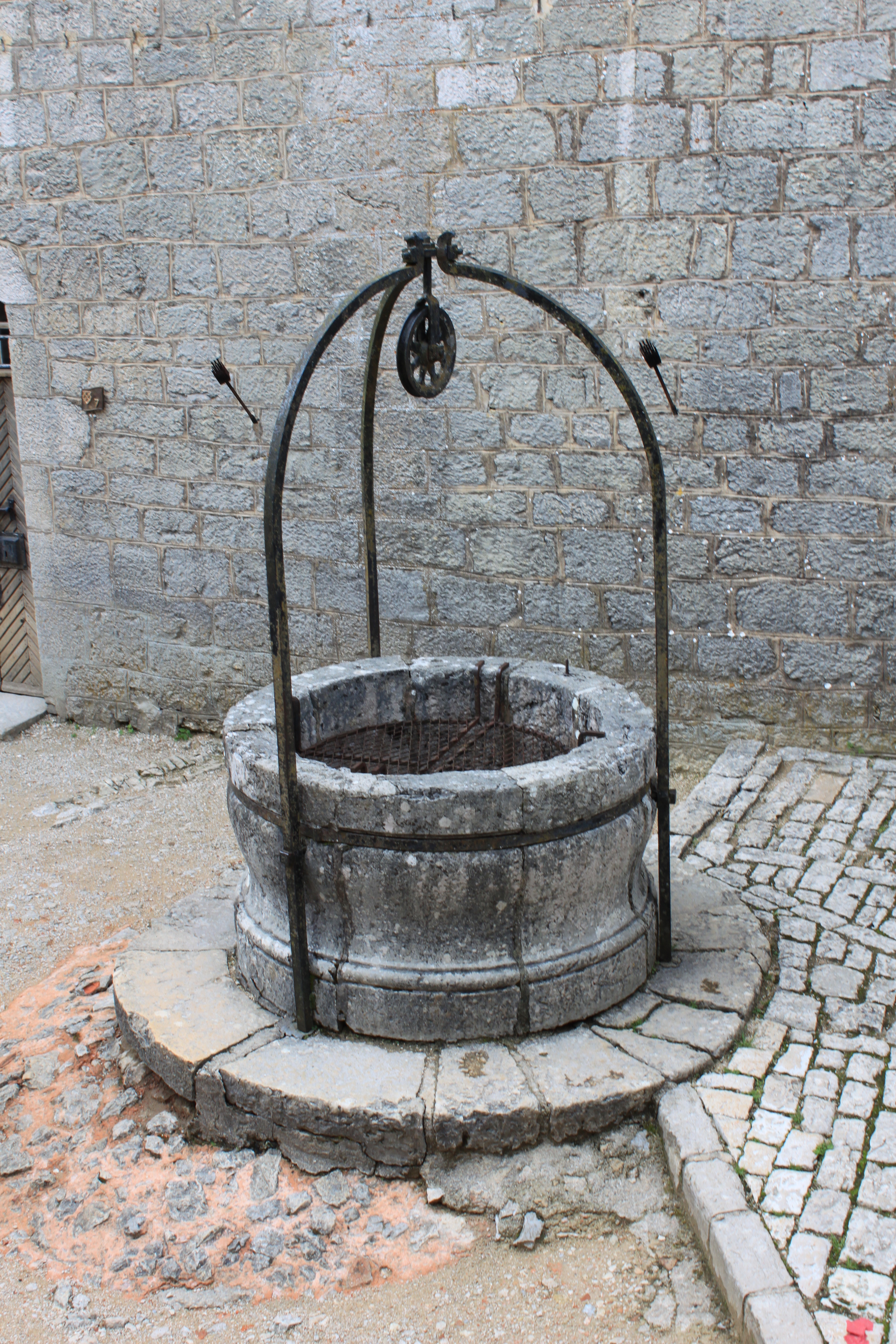 Fort de Joux, Doubs, Franche-Comté, France